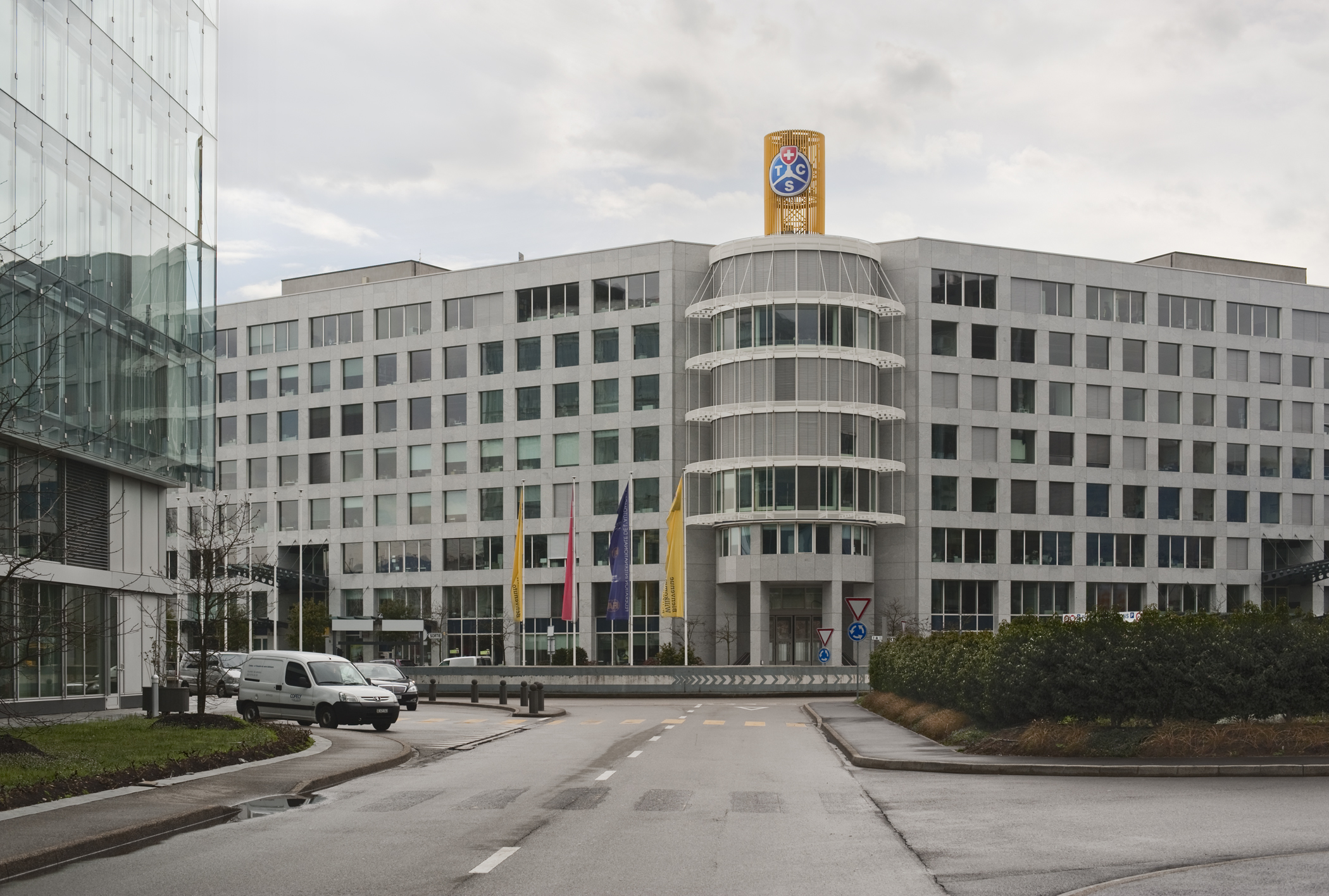 TCS – Siège Central TCS – Hauptsitz in Vernier